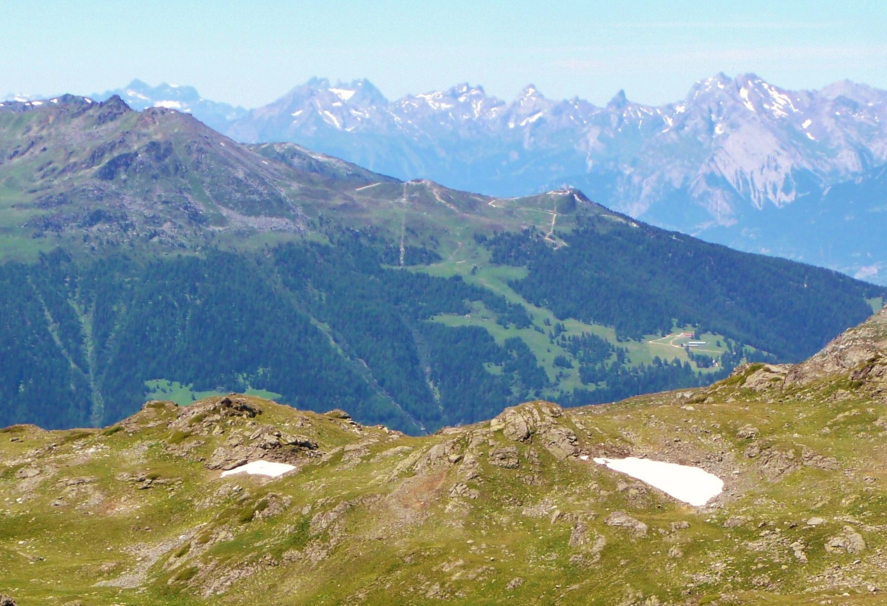 Blick auf die Crêt du Midi, oberhalb vom Feriendorf Vercorin im Schweizer Kanton Wallis.